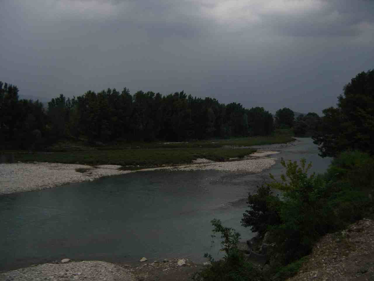 Adige outsite Verona